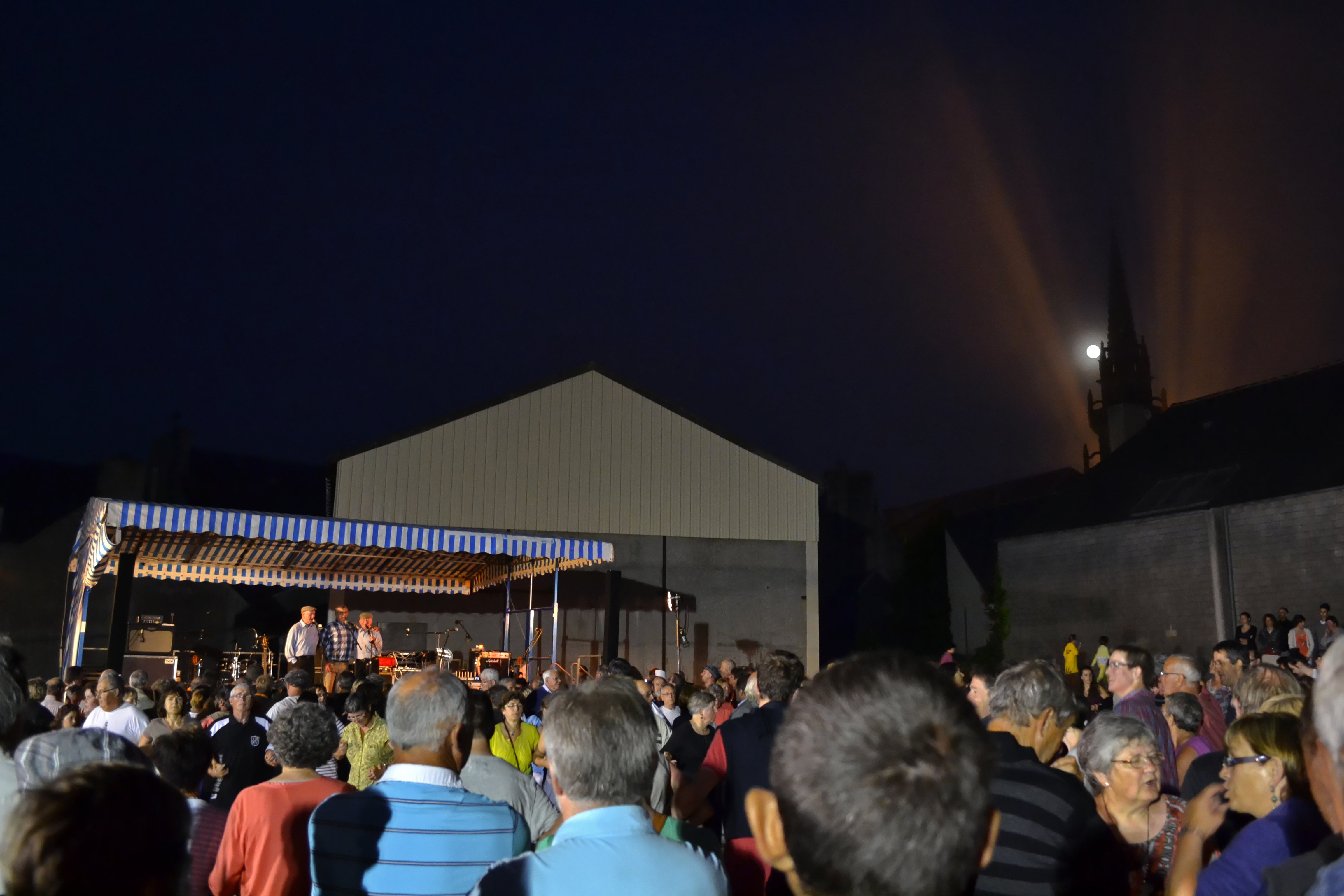 Fest-noz des Frères Morvan organisé pour conclure la course à pied des 100 km de Cléder (Finistère) le 21 juillet 2013.